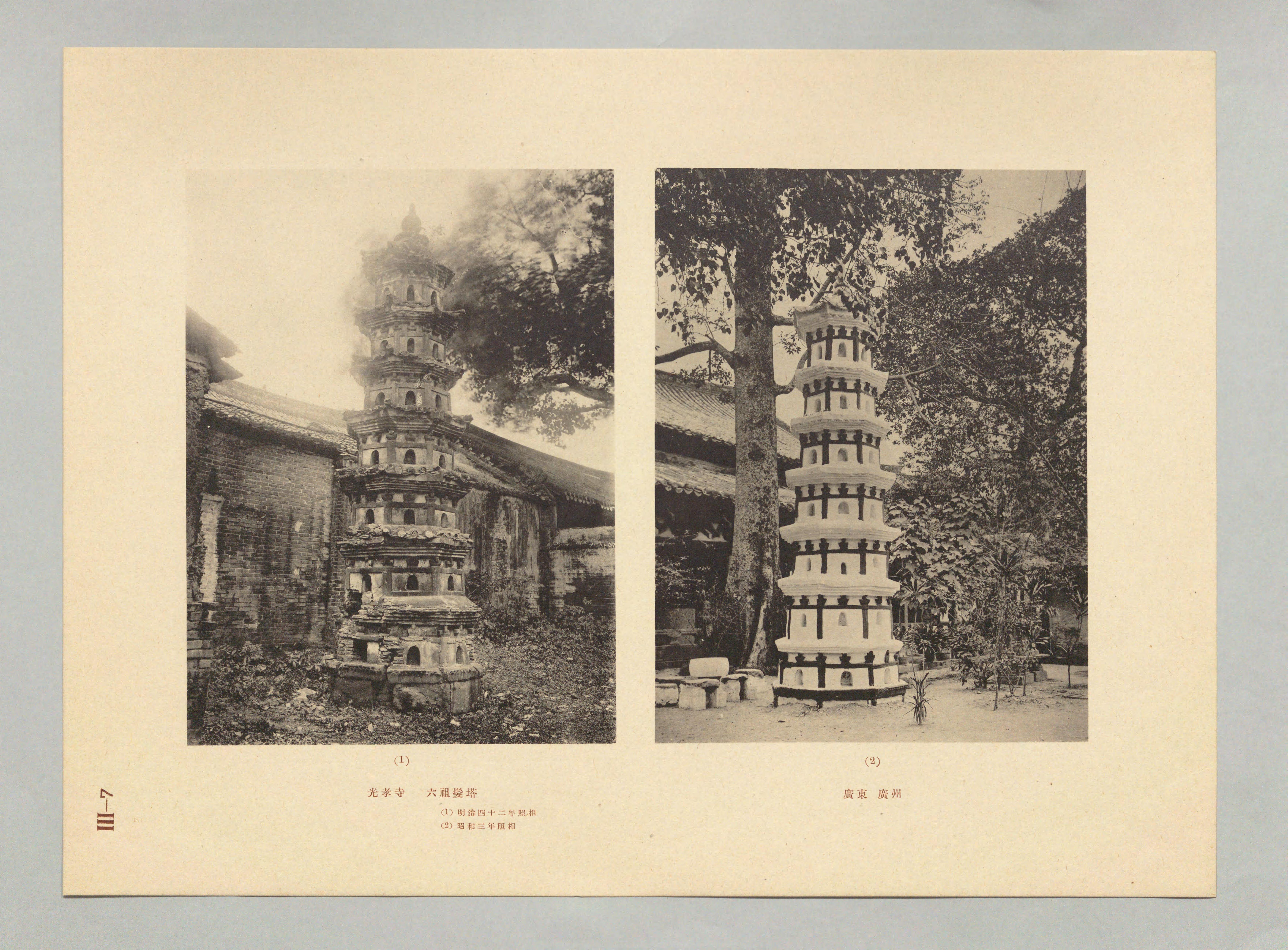 廣州市光孝寺內的六祖髮塔（瘞髮塔），攝於明治四十二年及昭和三年。